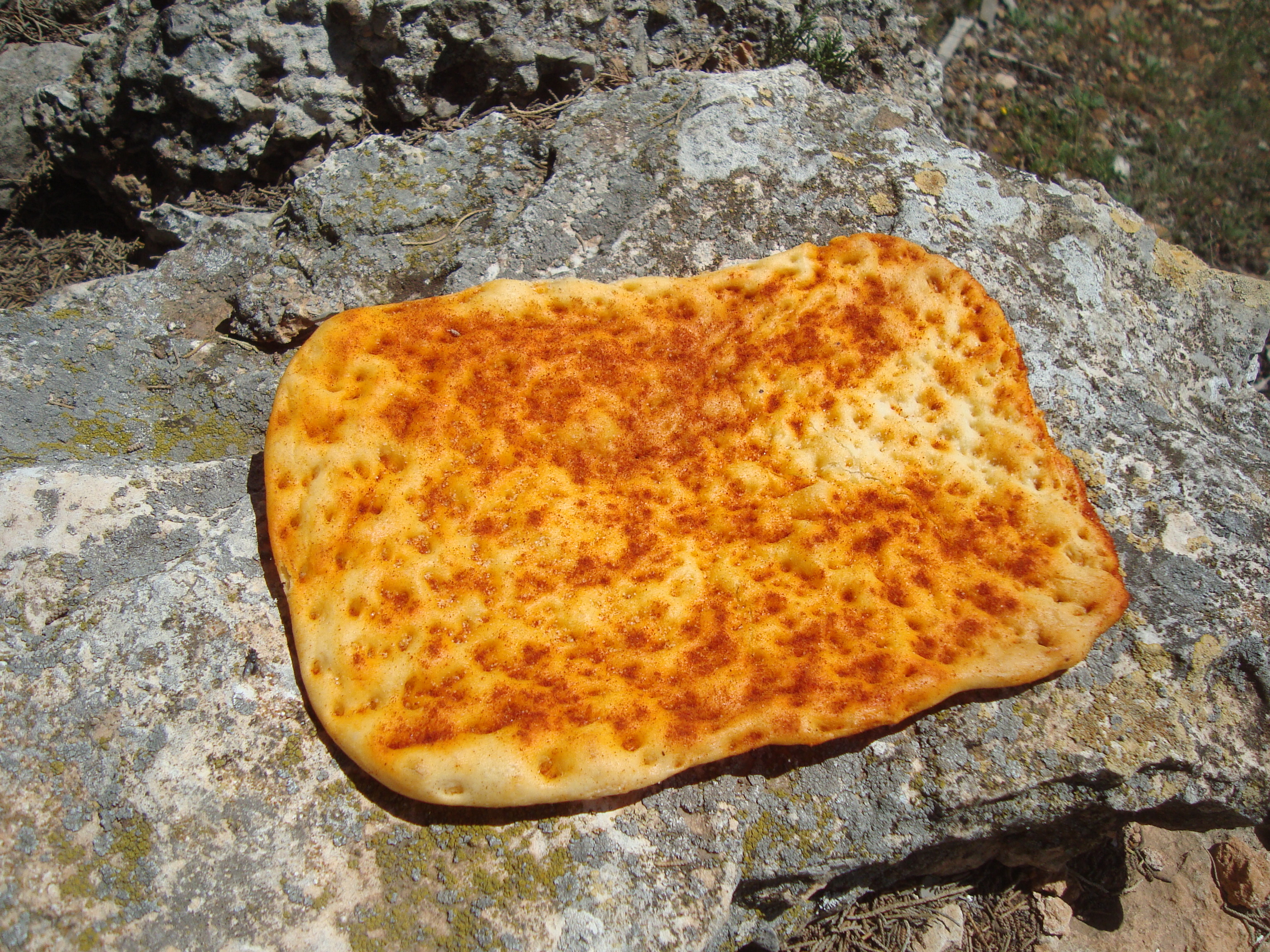 Coca delgada aromatizada con sal y pimentón dulce (Atzeneta del Maestrat)